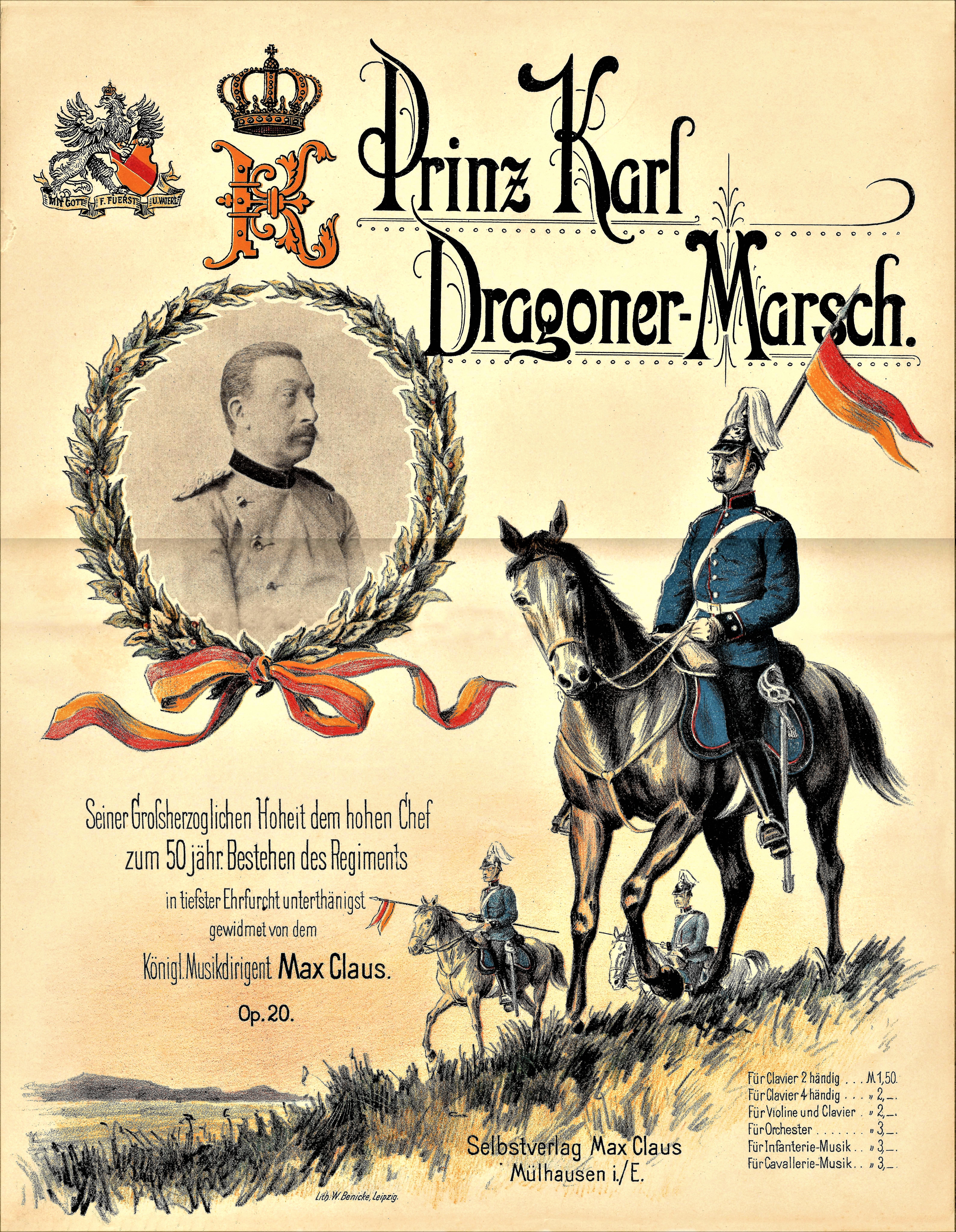 3. Badisches Dragoner-Regiment "Prinz Karl" Nr. 22